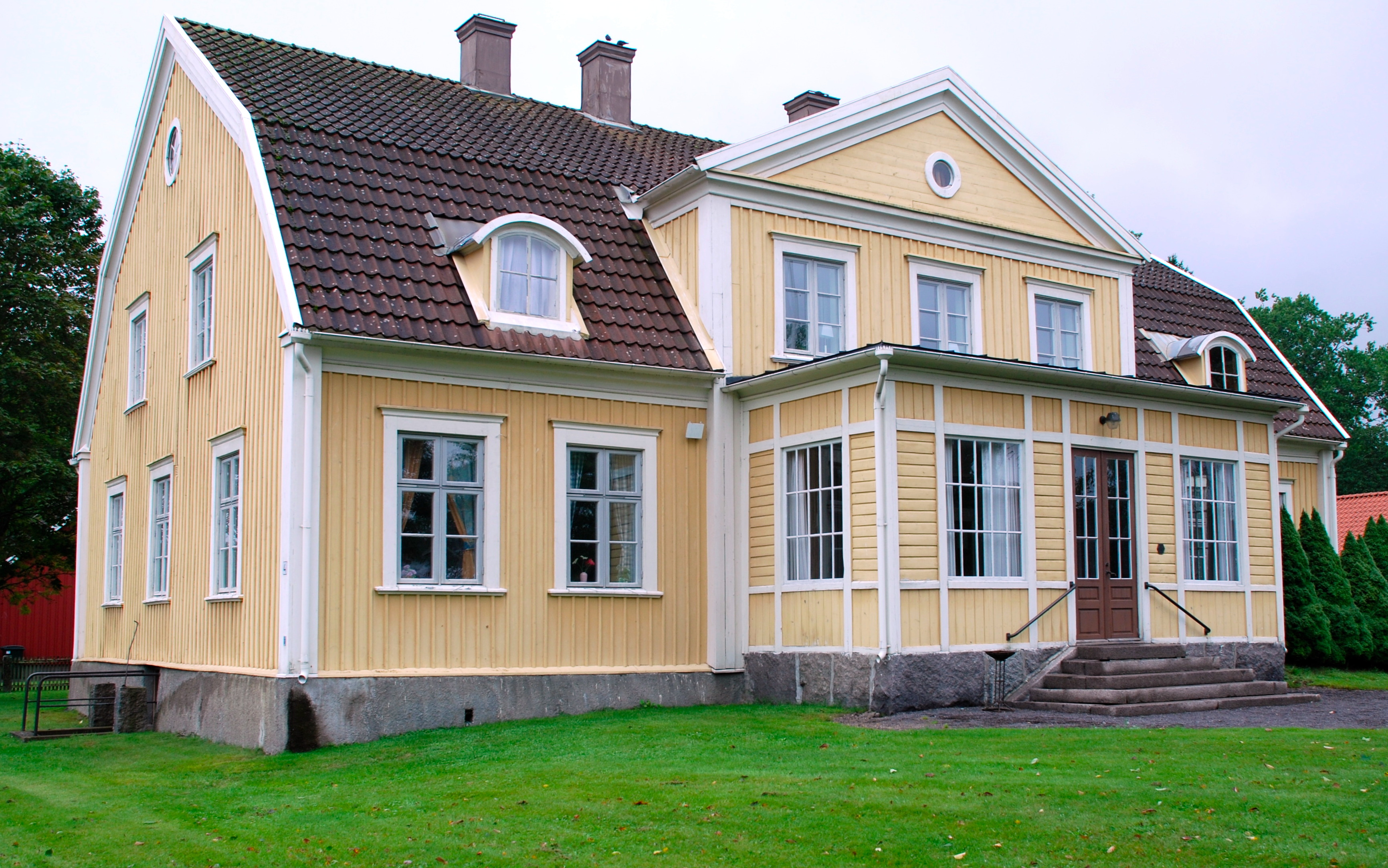 Tingshuset i Lenhovda